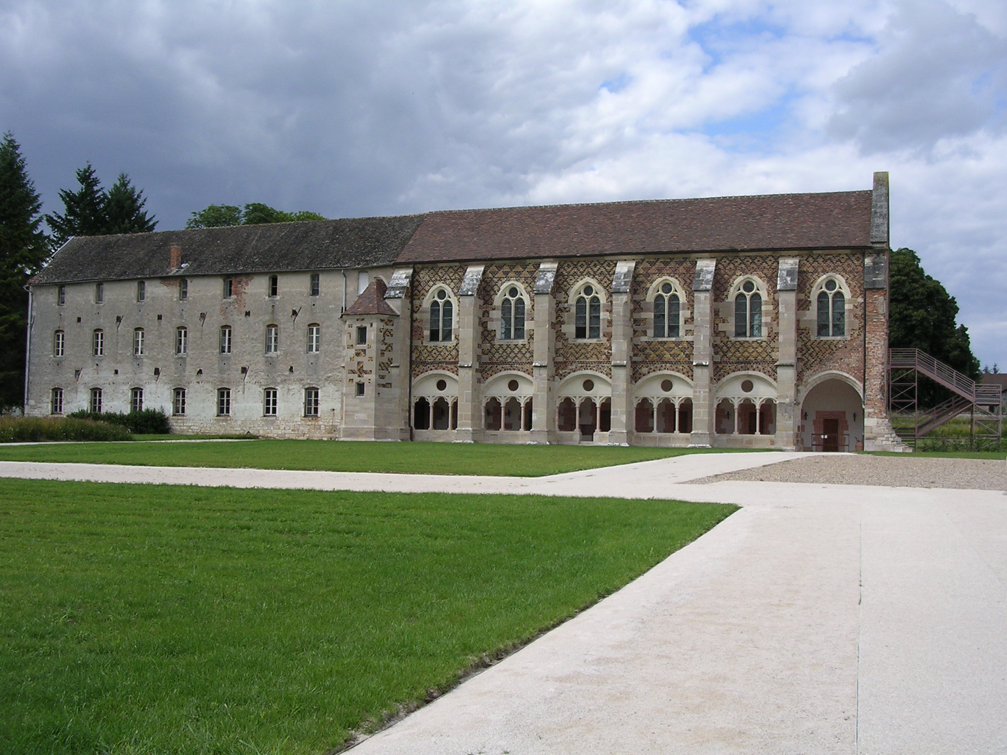 L'abbaye de Cîteaux la bibliothèque du XVIe siècle. Classée monument historique. Restaurée